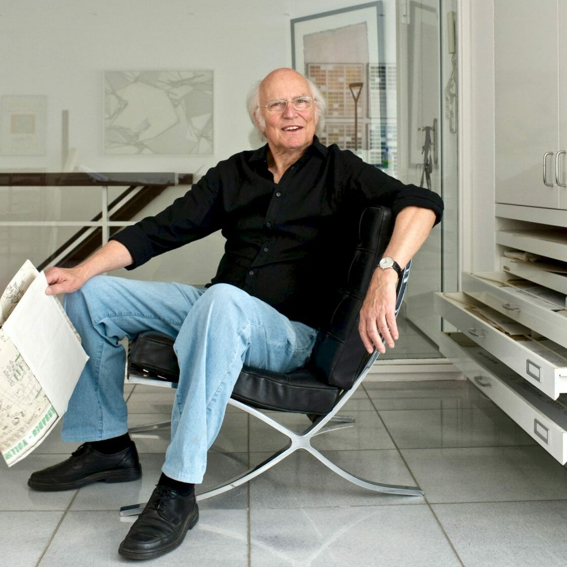 Hasn Albrecht Schilling im Atelier